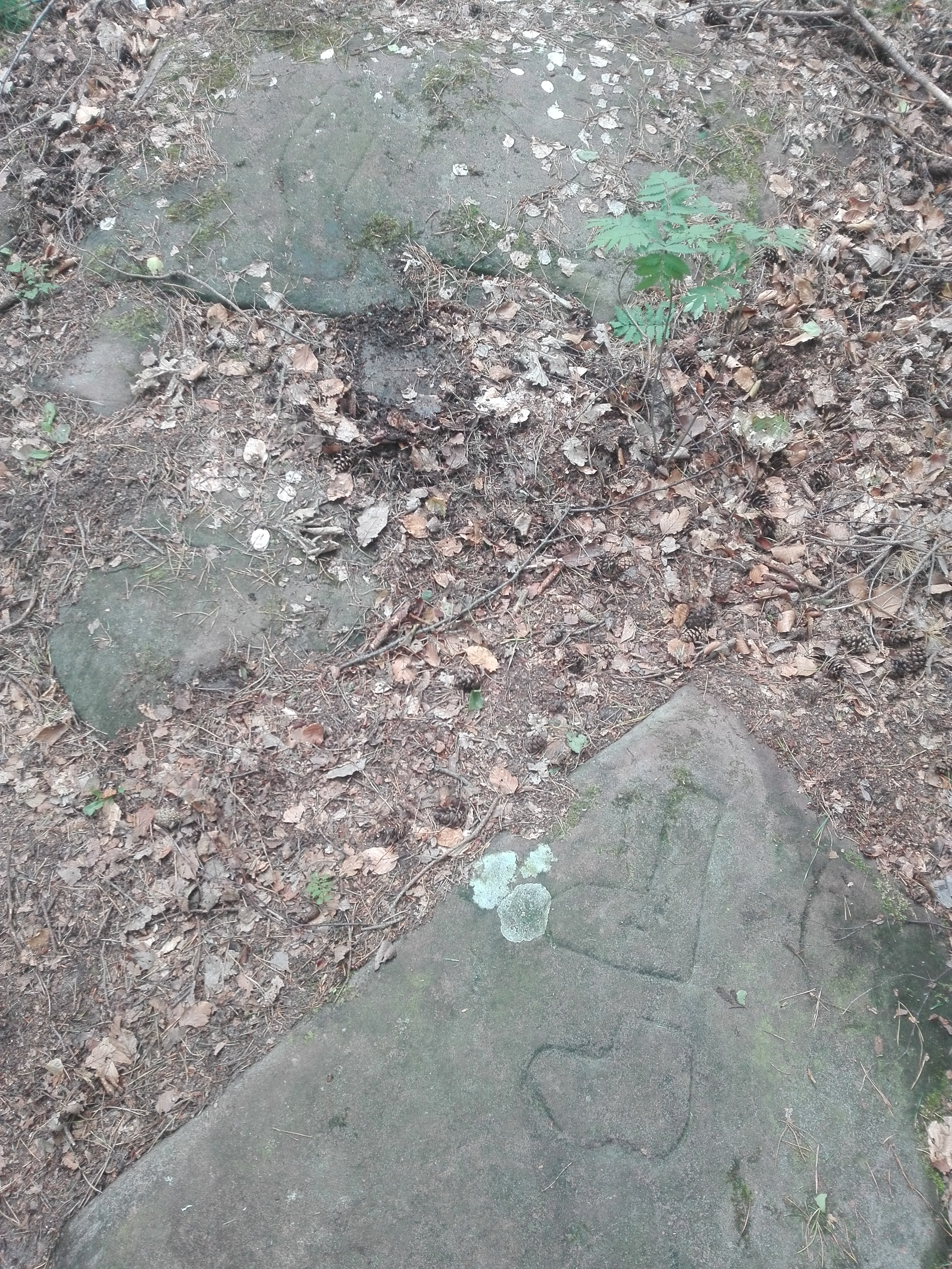 Der Christophel-Schuh unterhalb des Eckkopf-Gipfels auf der Gemarkung von Wachenheim an der Weinstraße ist als Kulturdenkmal ausgewiesen